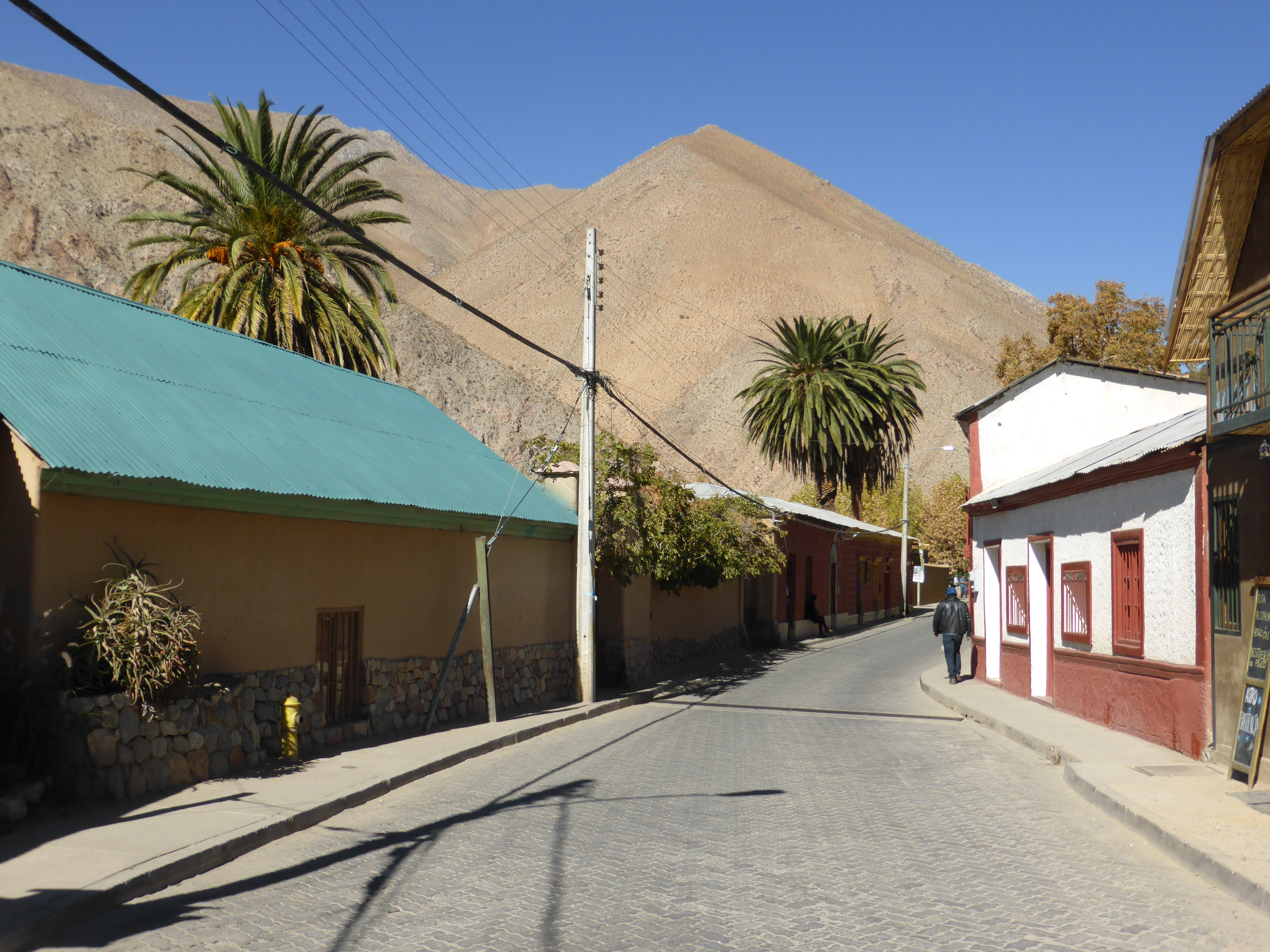 La localidad de Pisco Elqui se encuentra en el Valle de Elqui, en la IV Región de Coquimbo, en Chile. Los cerros inmediatos son de la precordillera de los Andes.